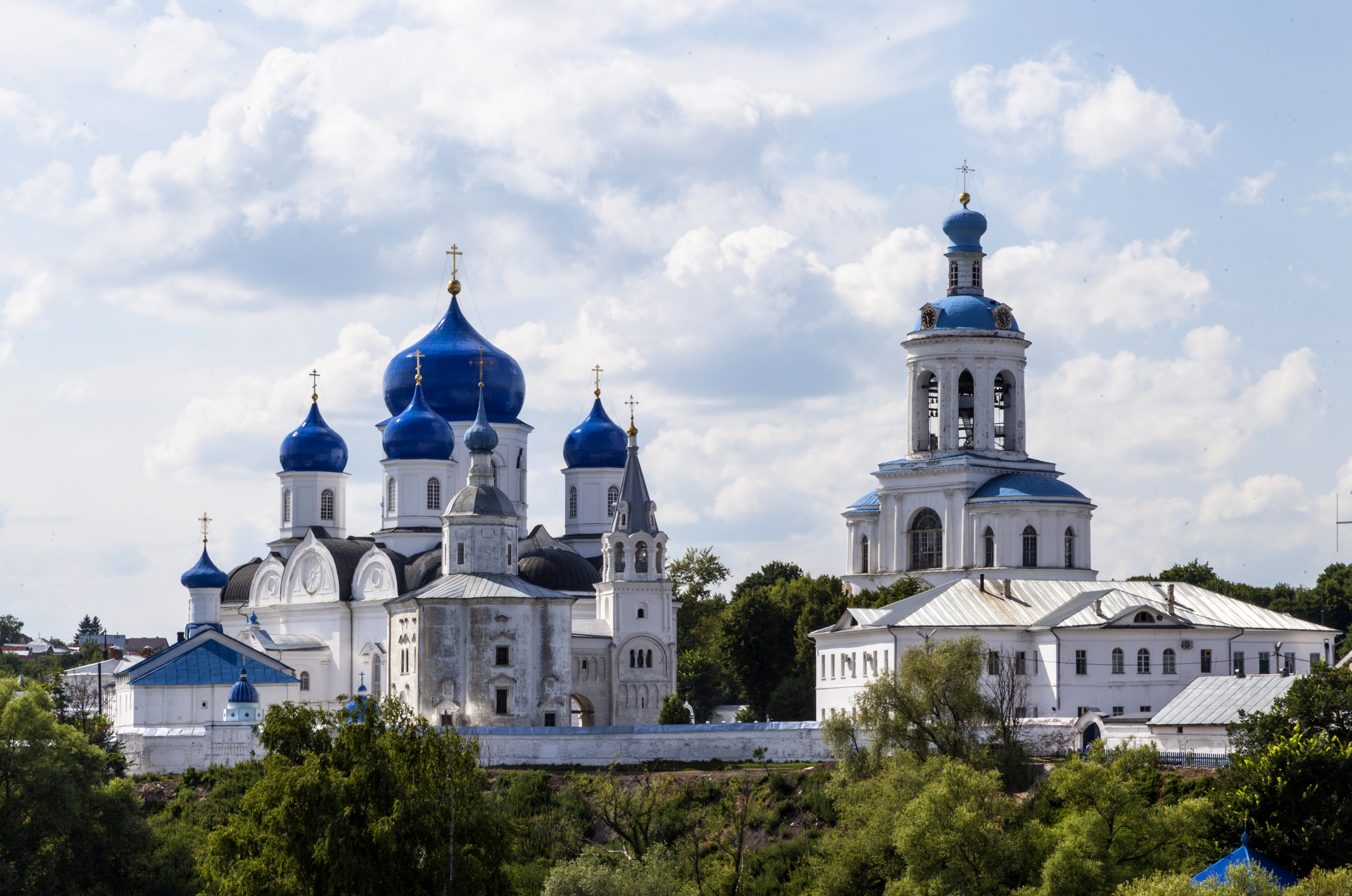 Поселок Боголюбово (Владимирская область, Владимир, р. п. Боголюбово)